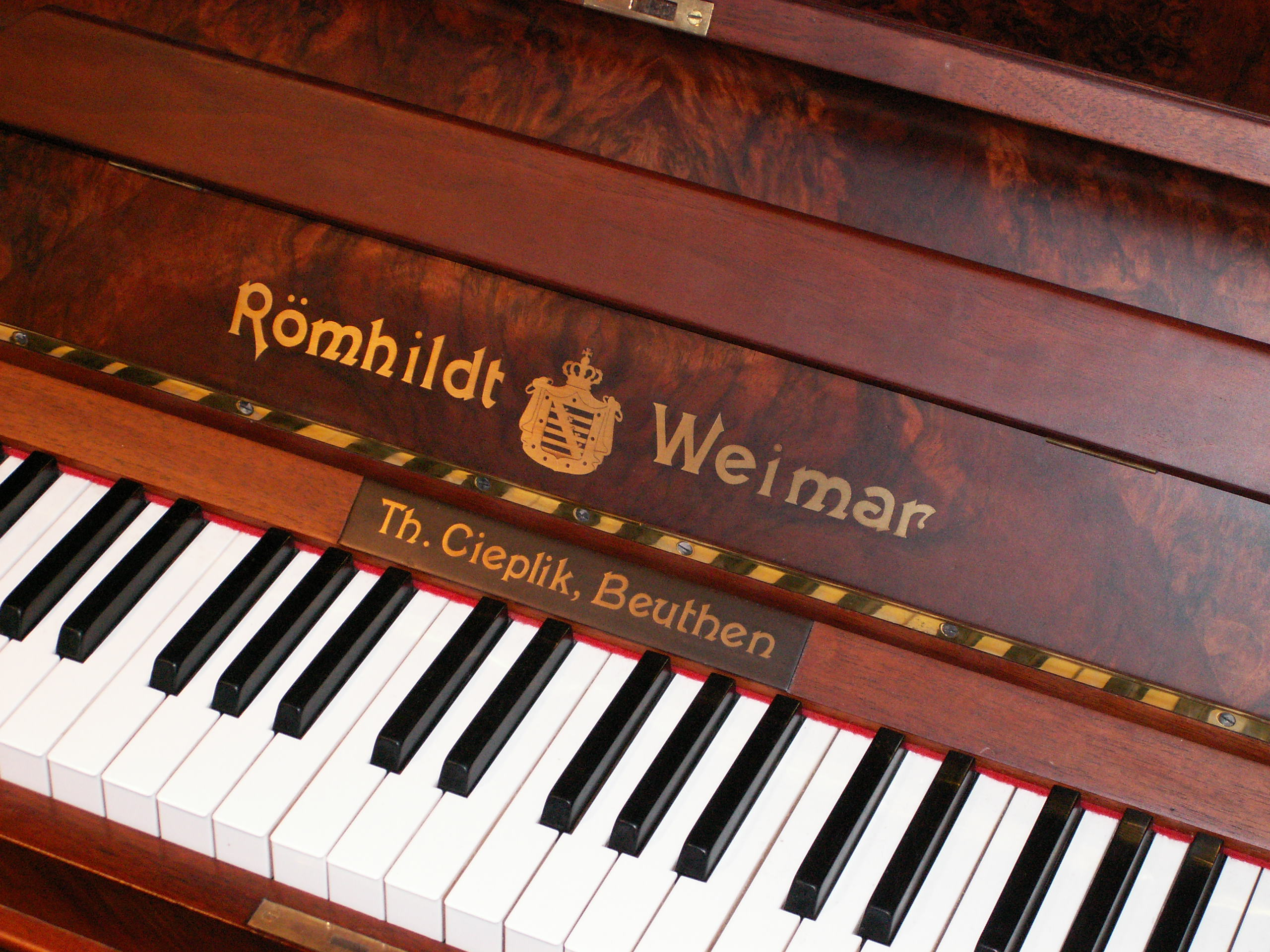 Cieplik, Beuthen